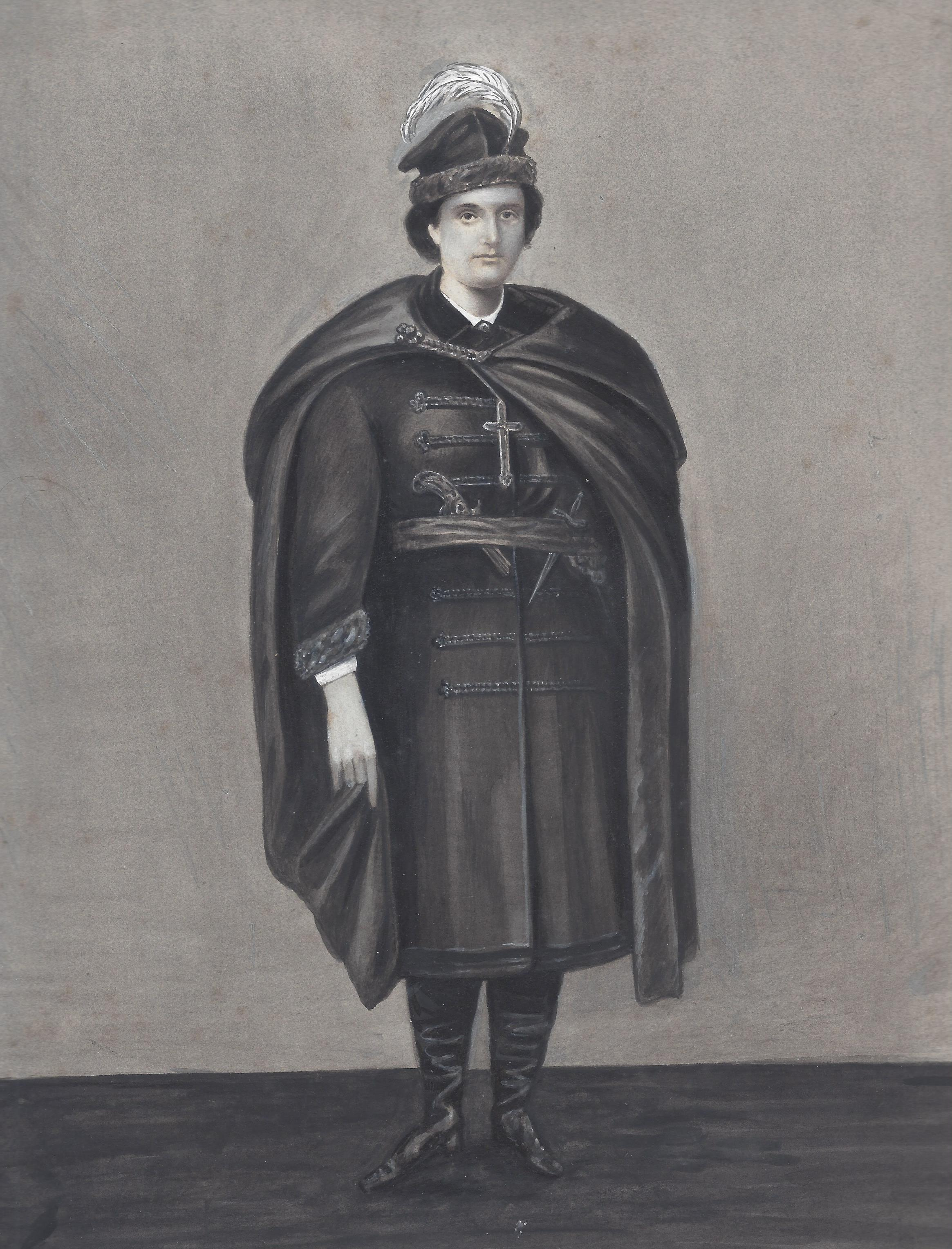 Anonym: Johann Caspar Albrecht. Larvierte Tuschzeichnung um 1880.